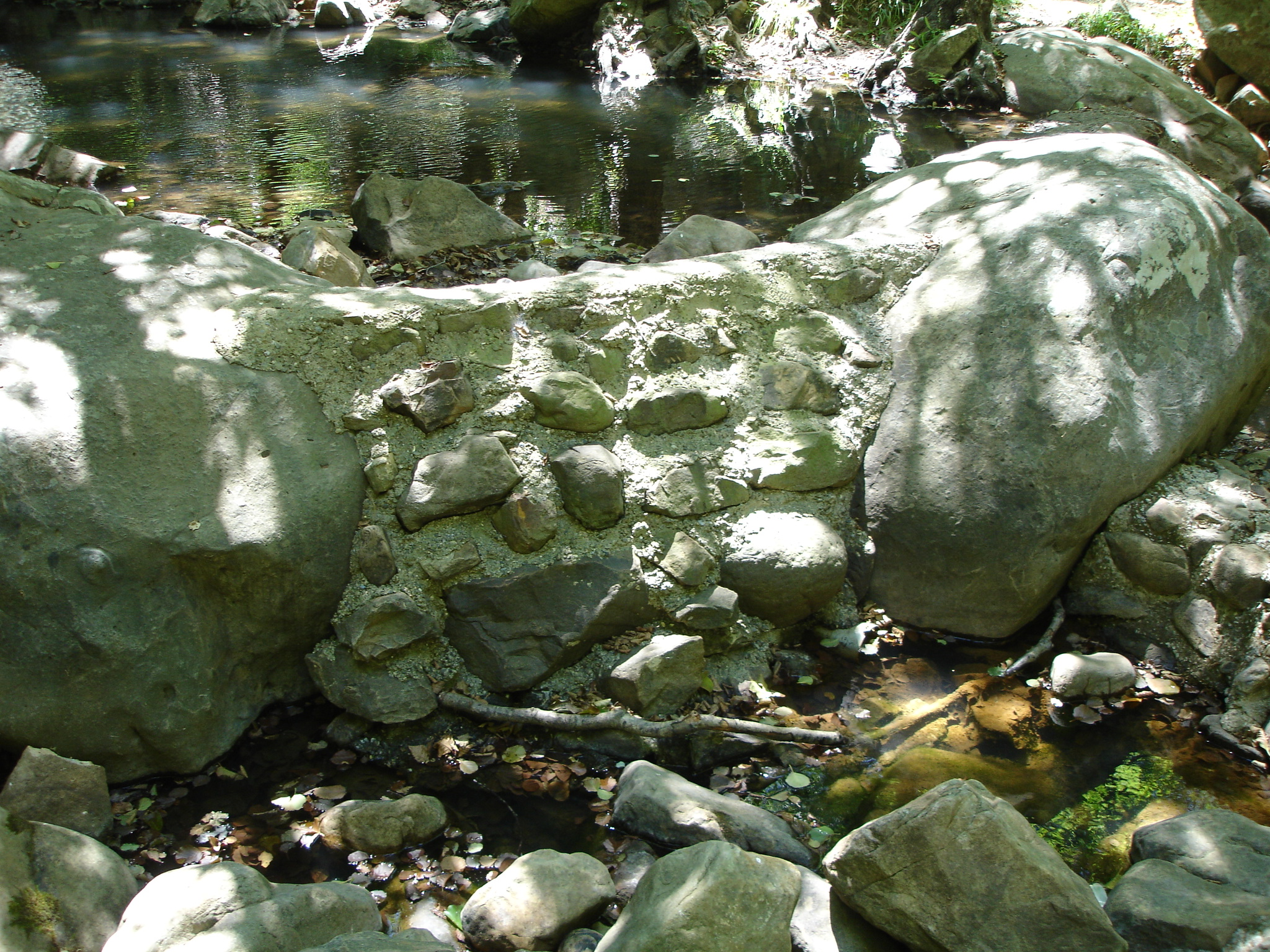 Estructura de un molino abandonado en el río de la Miel. Parque Natural de los Alcornocales. Andalucía (España)